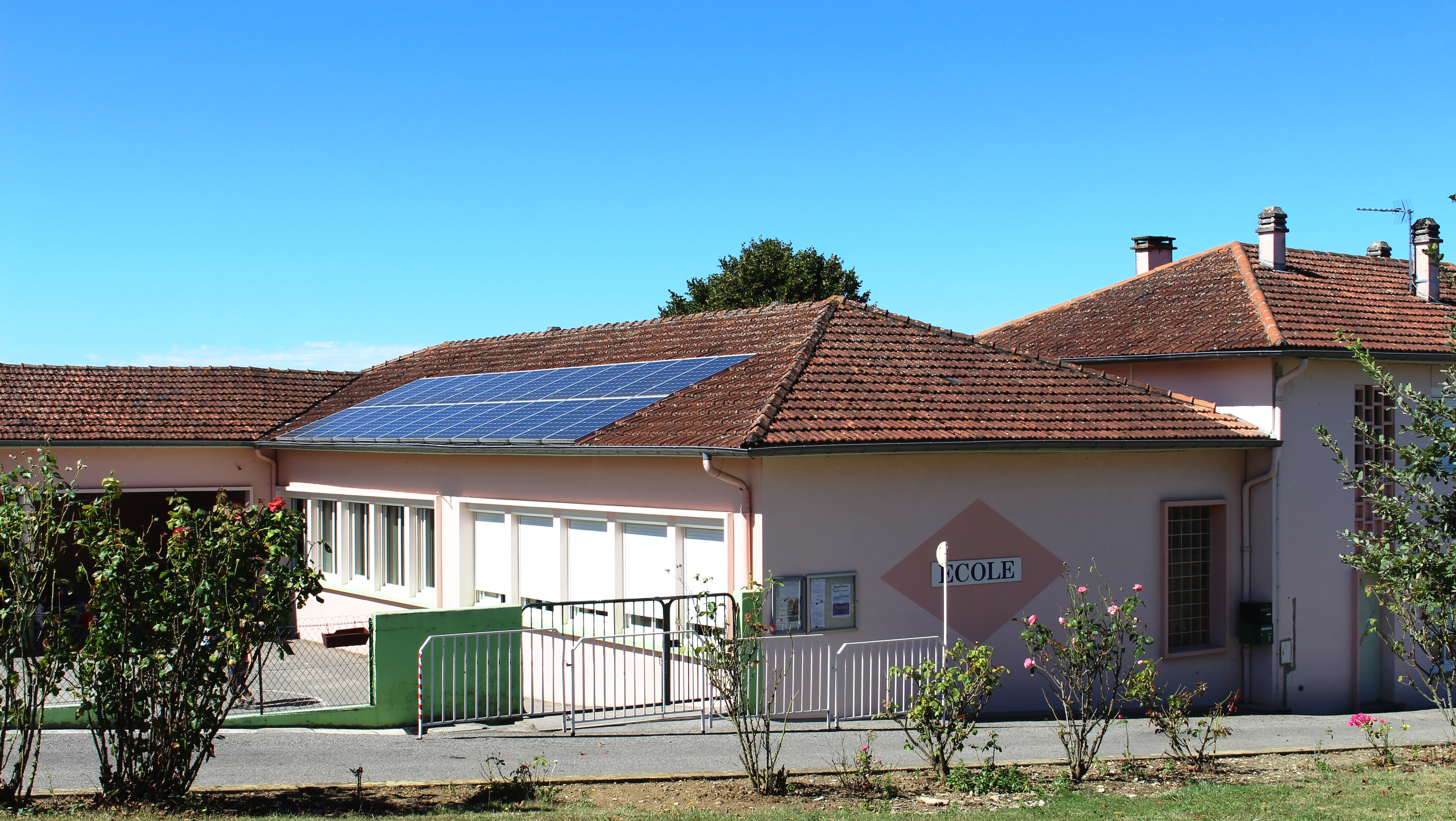 École de Lafitole (Hautes-Pyrénées)